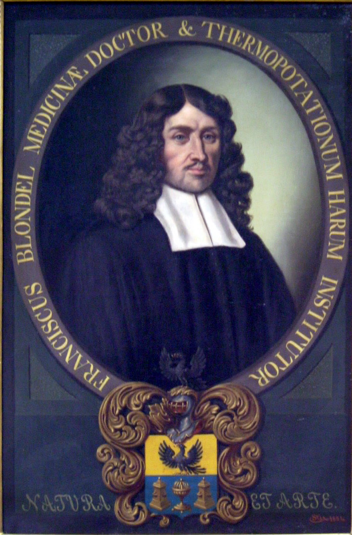 Porträt des Aachener Badearztes Franciscus Blondel (1613-1703)